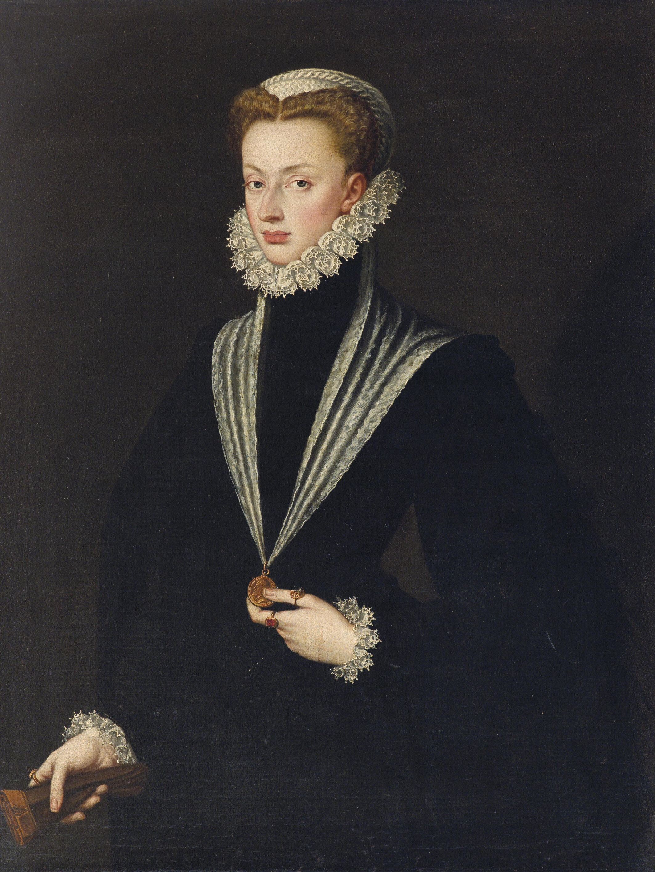 LangSwitch Error: no default